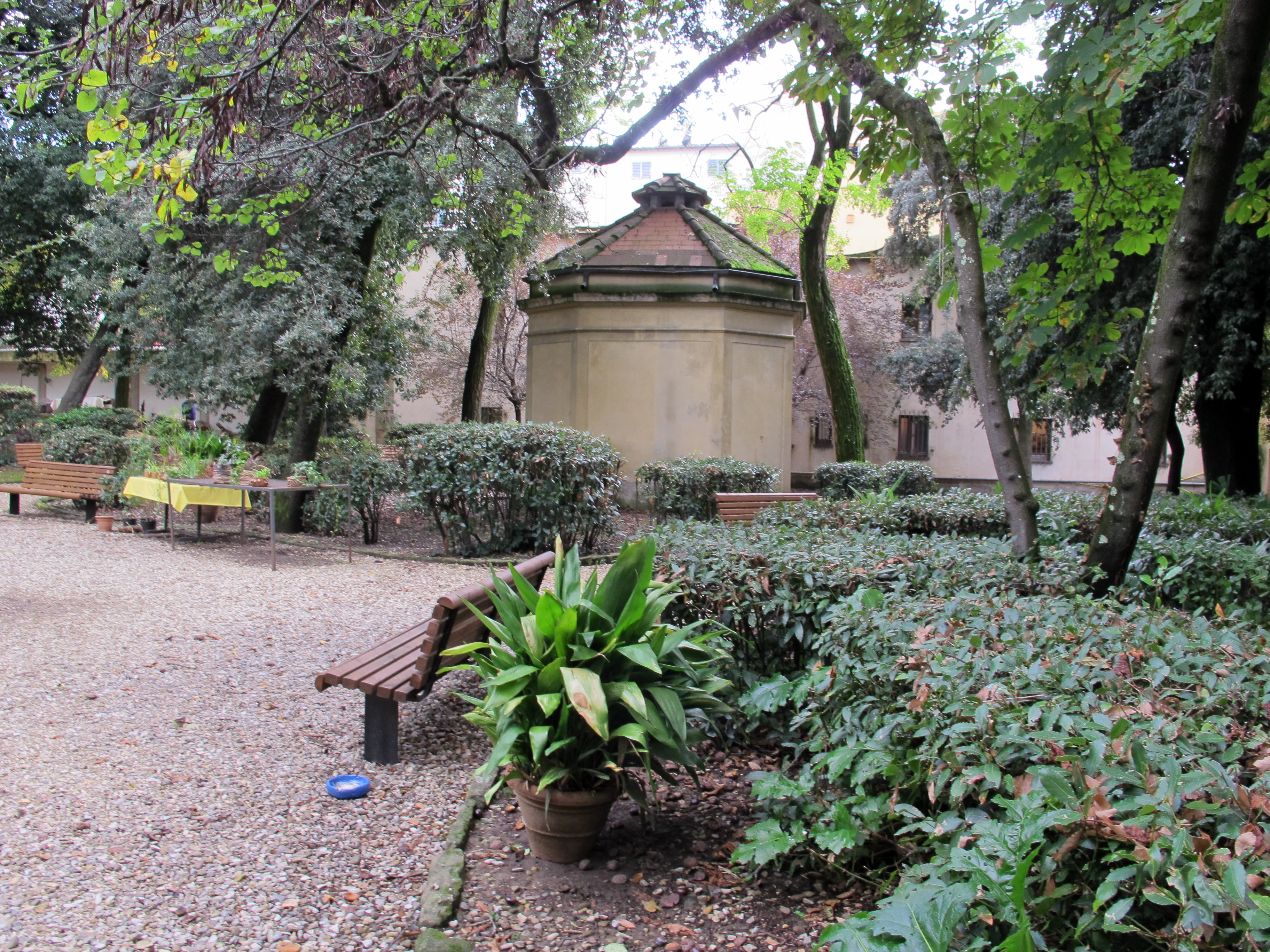 Borgo Pinti, Firenze